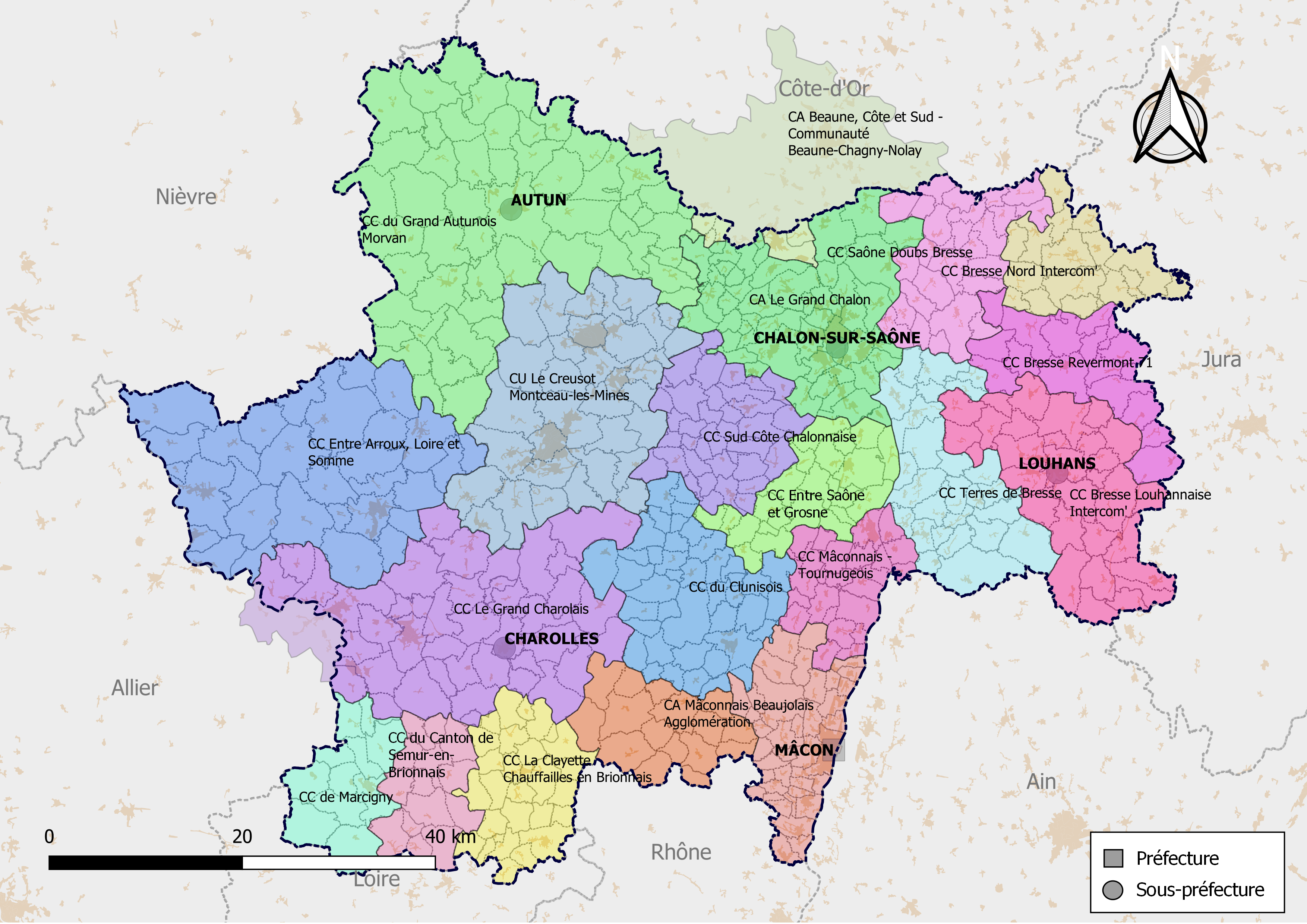 Carte des intercommunalités du département de Saône-et-Loire, France. Composition au 1er janvier 2019.